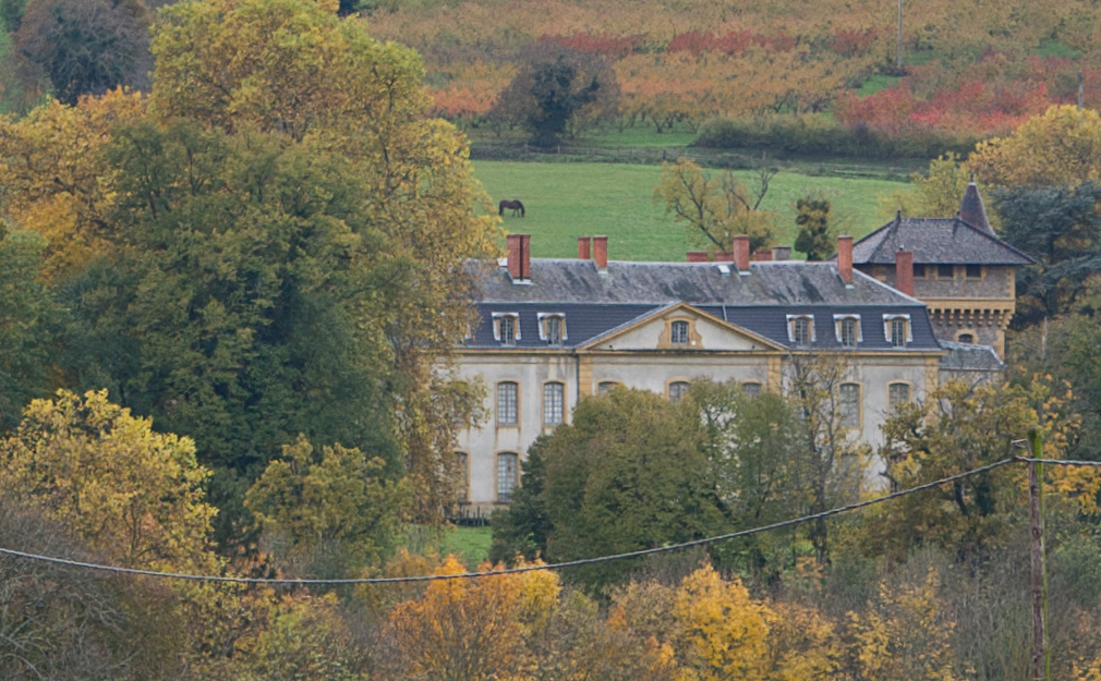 Château d'Avauges, (InscritInscrit, 19812010) .